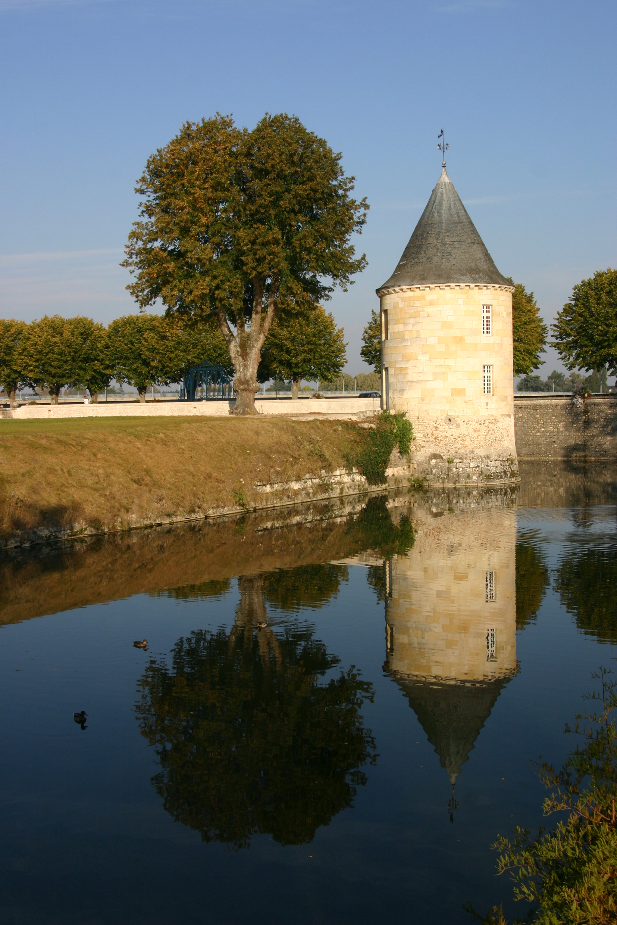 Schloss Sully-sur-Loire